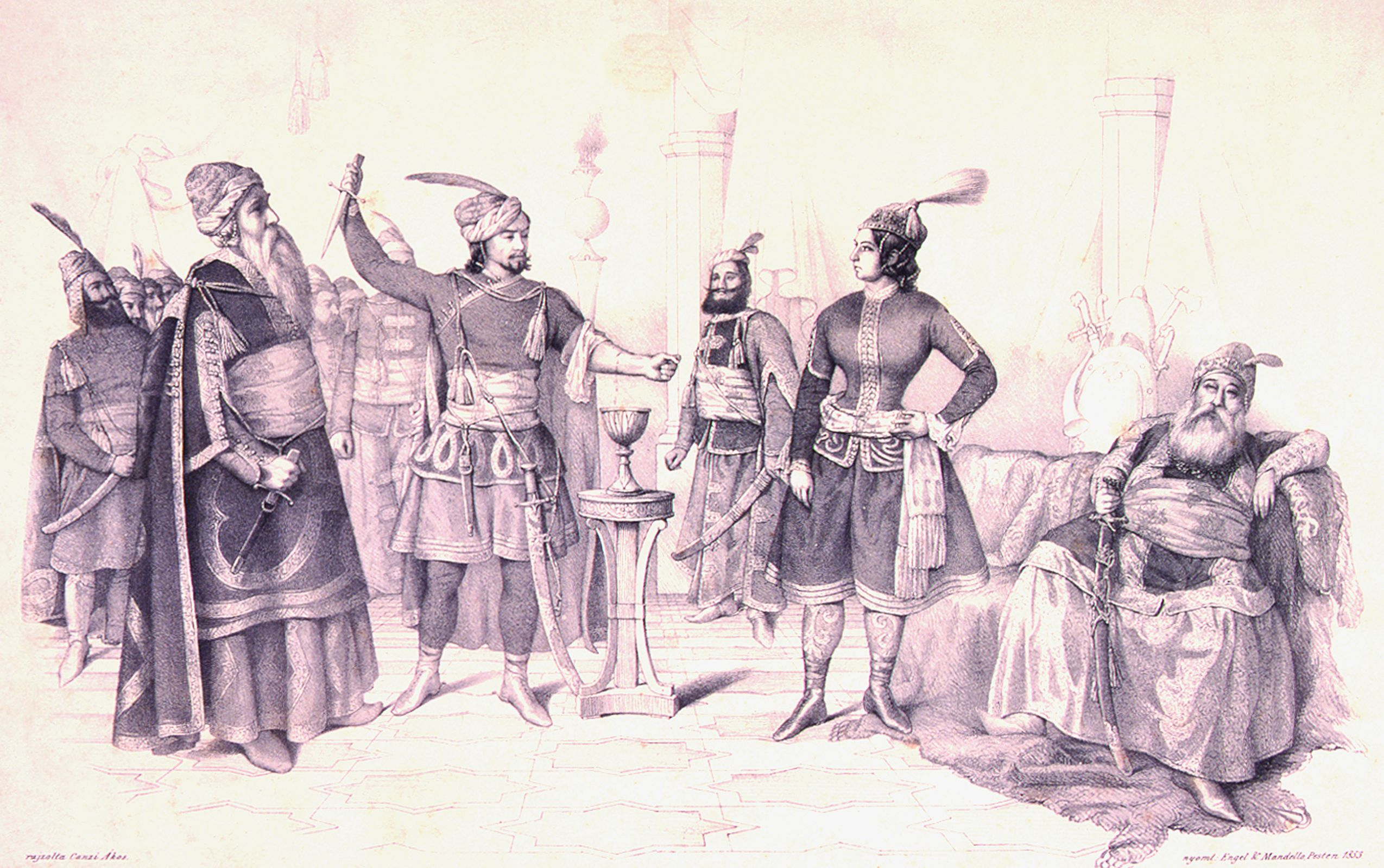 Udvarhelyi Miklós mint Táltos, id. Lendvay Márton mint Elemér, Jókainé Laborfalvi Róza mint Dalma, Szentpétery Zsigmond mint Oldamur